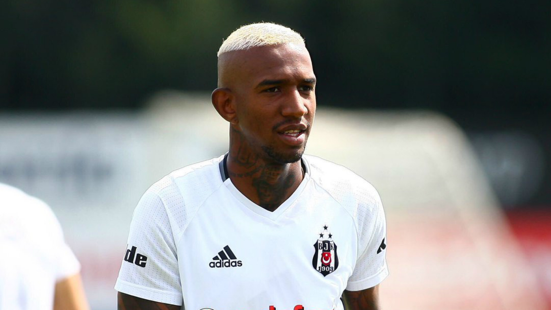 Photo Anderson Talisca before the Champions League game against Leipzig.